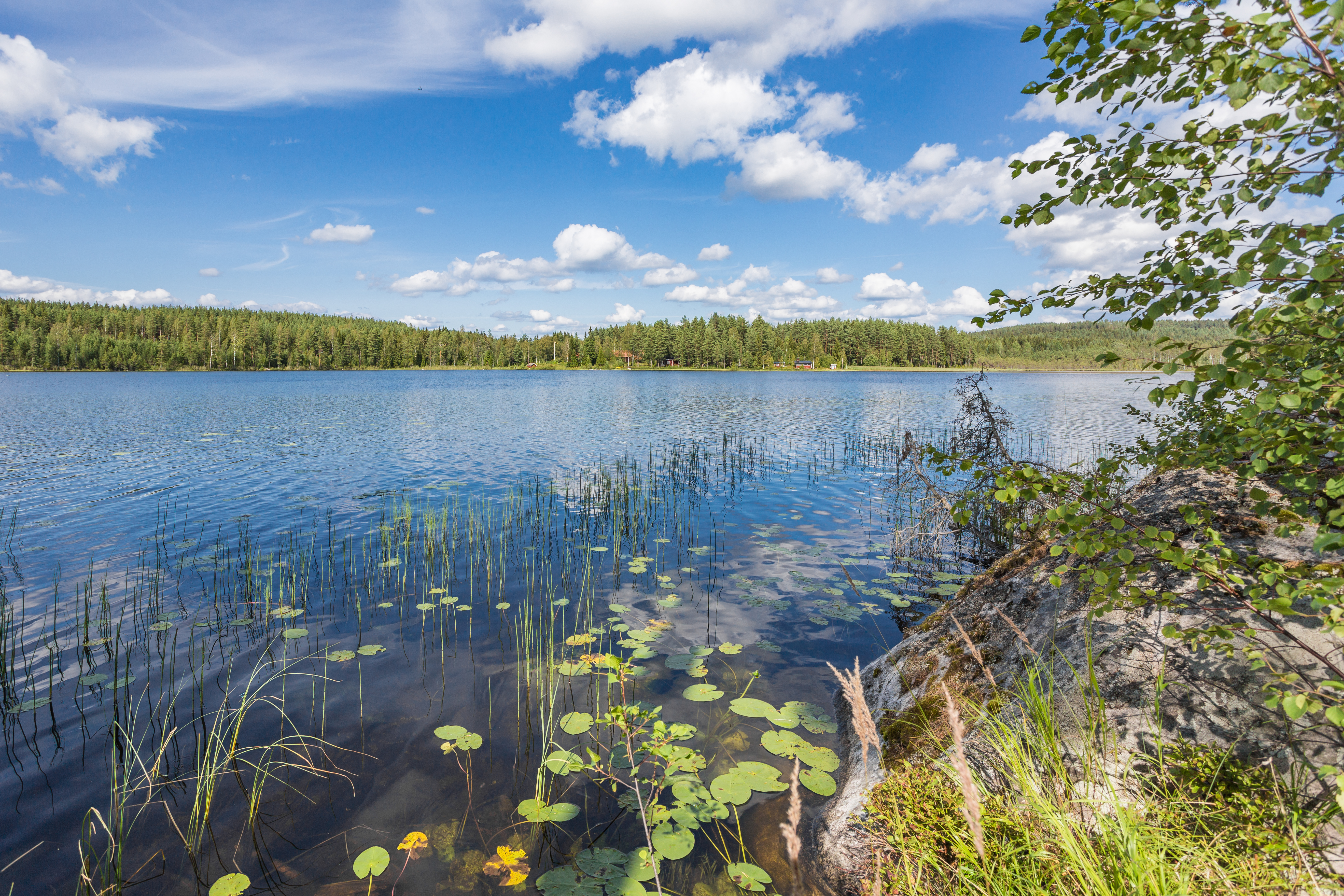 Vikhyttsjön (även kallad Vikhyttesjön), Hedemora kommun, Dalarnas län, Sverige